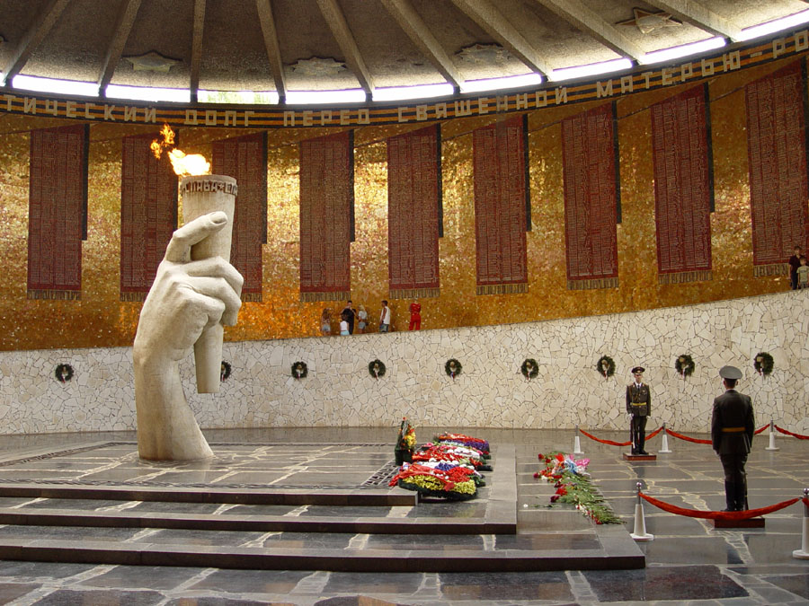 Vechnii_ogon Вечный огонь в комплексе на Мамаевом Кургане, г. Волгоград